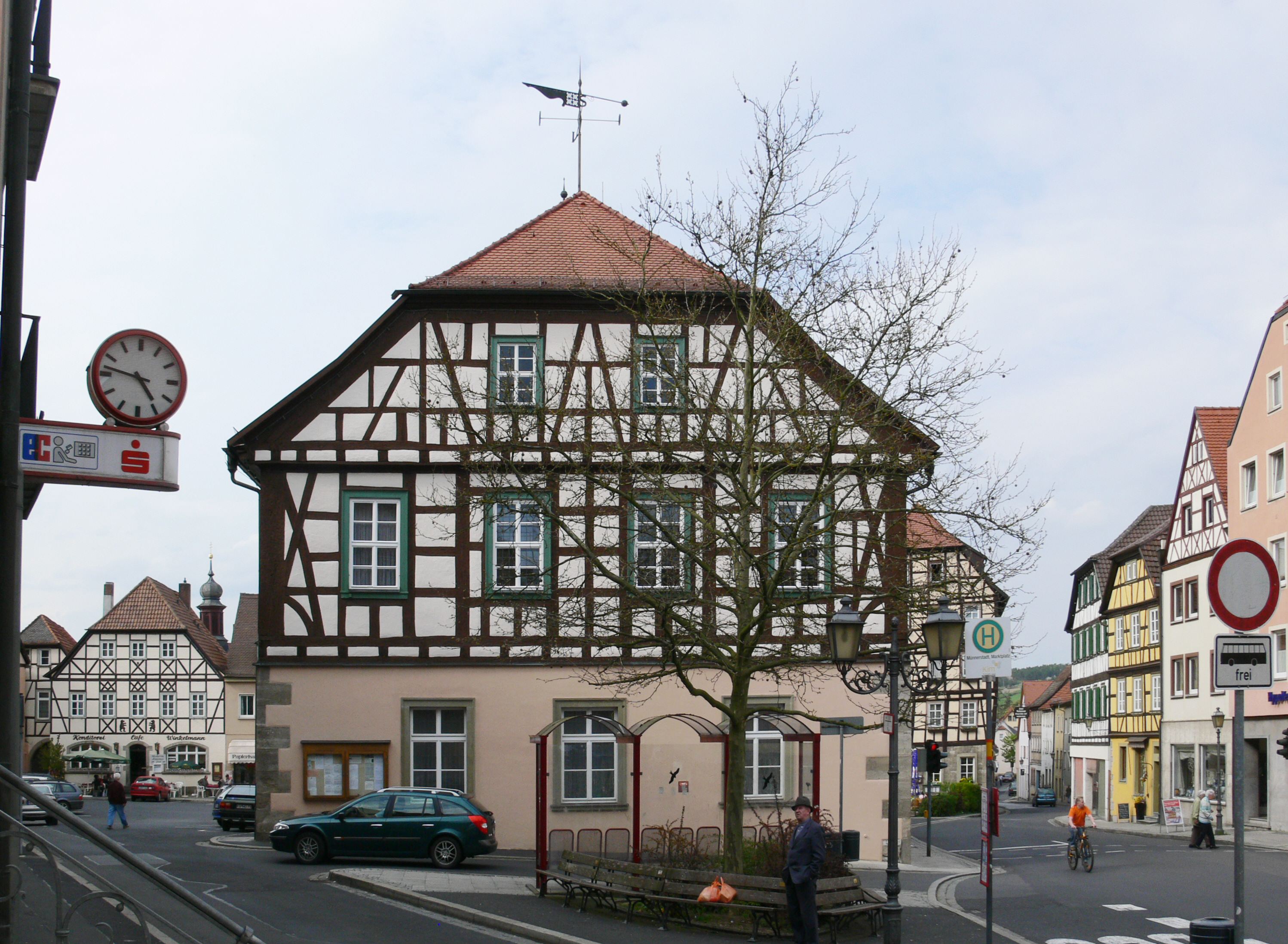 Münnerstadt, Marktplatz, Rathaus